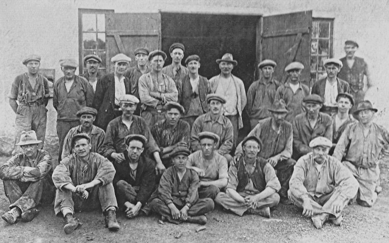 Brogårds tegelbruks arbetare